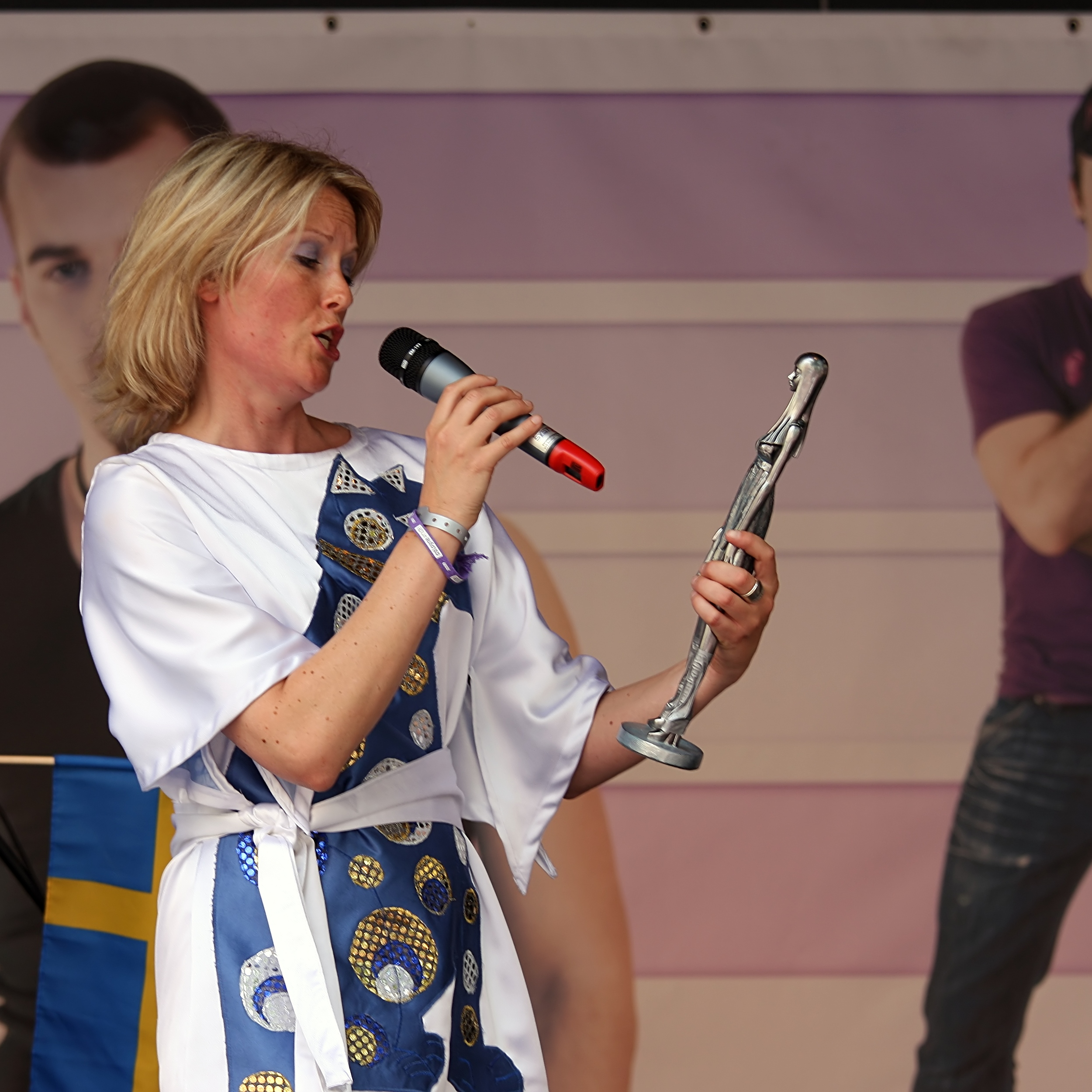 Meike Gottschalk als „Agnetha“ von Abba mit Auszügen aus ihrem Programm „Agnetha und ich“ auf der Politur-Bühne „Politik trifft Kultur“ auf dem Alter Markt, Köln. Bühnenprogramm zum CSD-Straßenfest/ColognePride 2009.